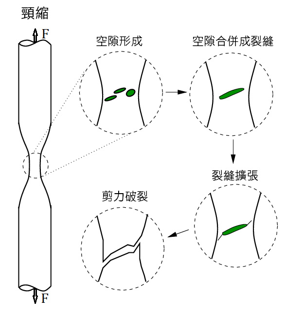 延性破裂典型的錐杯形破裂形成步驟。